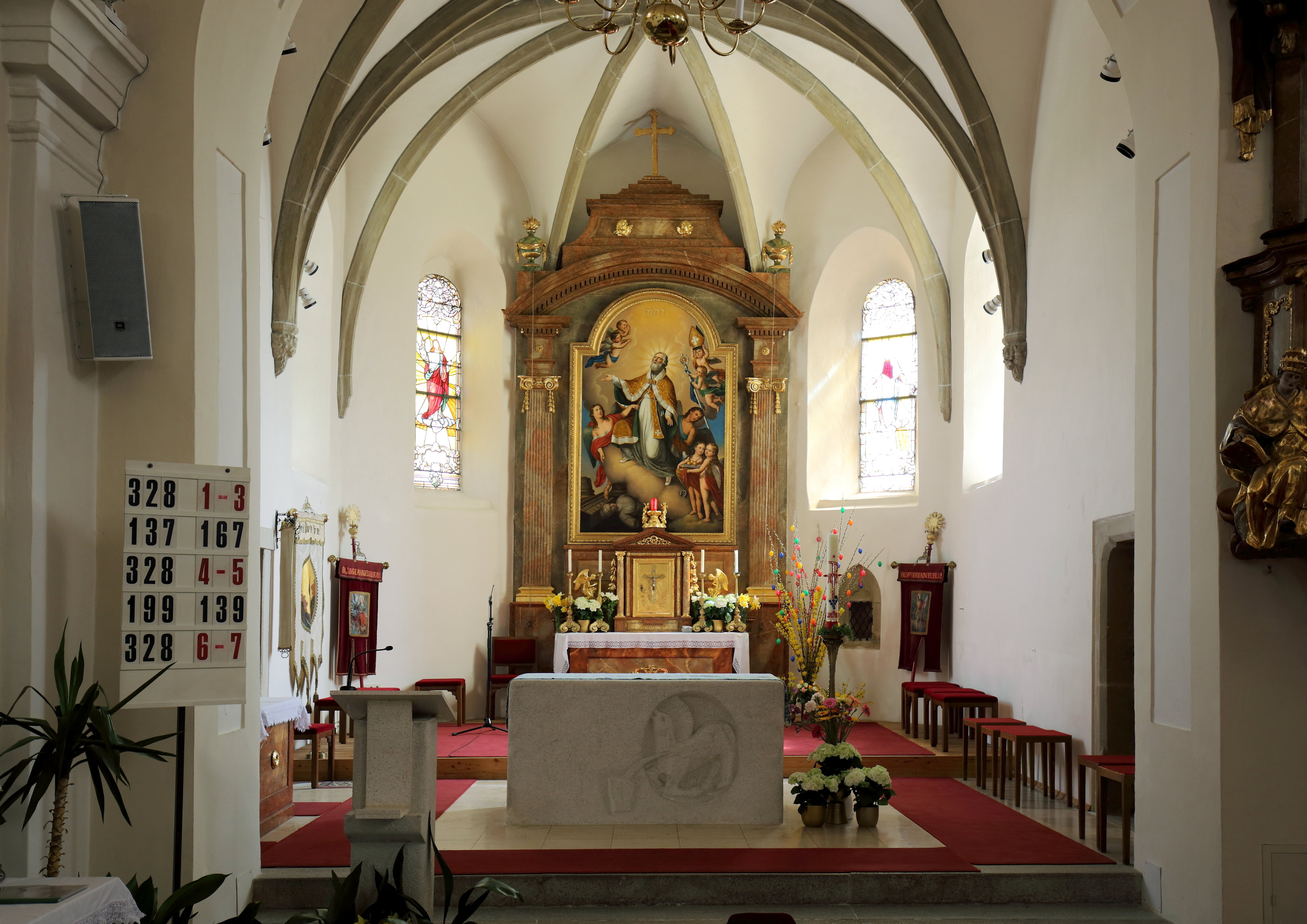 Hochaltar der katholischen Pfarrkirche hl. Nikolaus in der niederösterreichischen Marktgemeinde Großebersdorf.